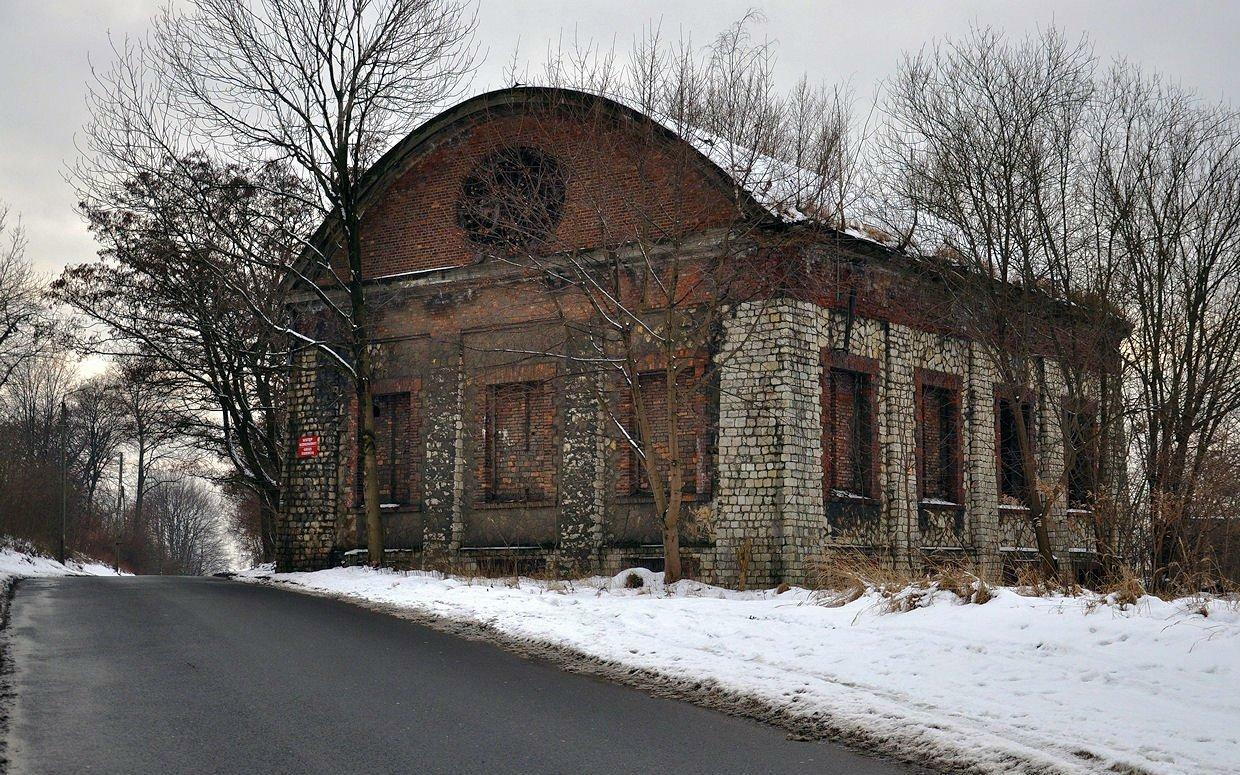 Budynek maszynowni szybu Zygmunt - jedyny ocalały budynek po kopalni węgla kamiennego "Maria" w Grodźcu. W szybie tym pracował prawdopodobnie pierwszy skip (5 ton) w Polsce. Kopalnię Grodziec I zamknieto w 1938r ale szyb Zygmunt był wykorzystywany aż do 1984r, dla celów niegórniczych - zjazdu i wyjazdu ludzi obsługujących komorę pomp urządzoną dla pompowania wody dla celów pitnych mieszkańców Grodźca. W 1947r został częściowo zmodernizowany. Zabudowano na nim maszyne wyciągową dwubębnową "Wilhelms Hite". Komora pomp urządzona była w sąsiedztwie szybu na poziomie 160m i posiadała wentylację lutniową. W 1971r. w szybie zostały przeprowadzone próby ruchowe nowej konstrukcji łapadeł pirotechnicznych naczyń wydobywczych z wyzwalaniem elektronicznym. W 1984 zlikwidowano komorę pomp, zlikwidowano również urządzenia wyciągowe i wieżę szybową,pozostawiając jedynie budynek maszyny wyciągowej. W wyniku tego lustro wody podniosło się do 75m od powierzchni.